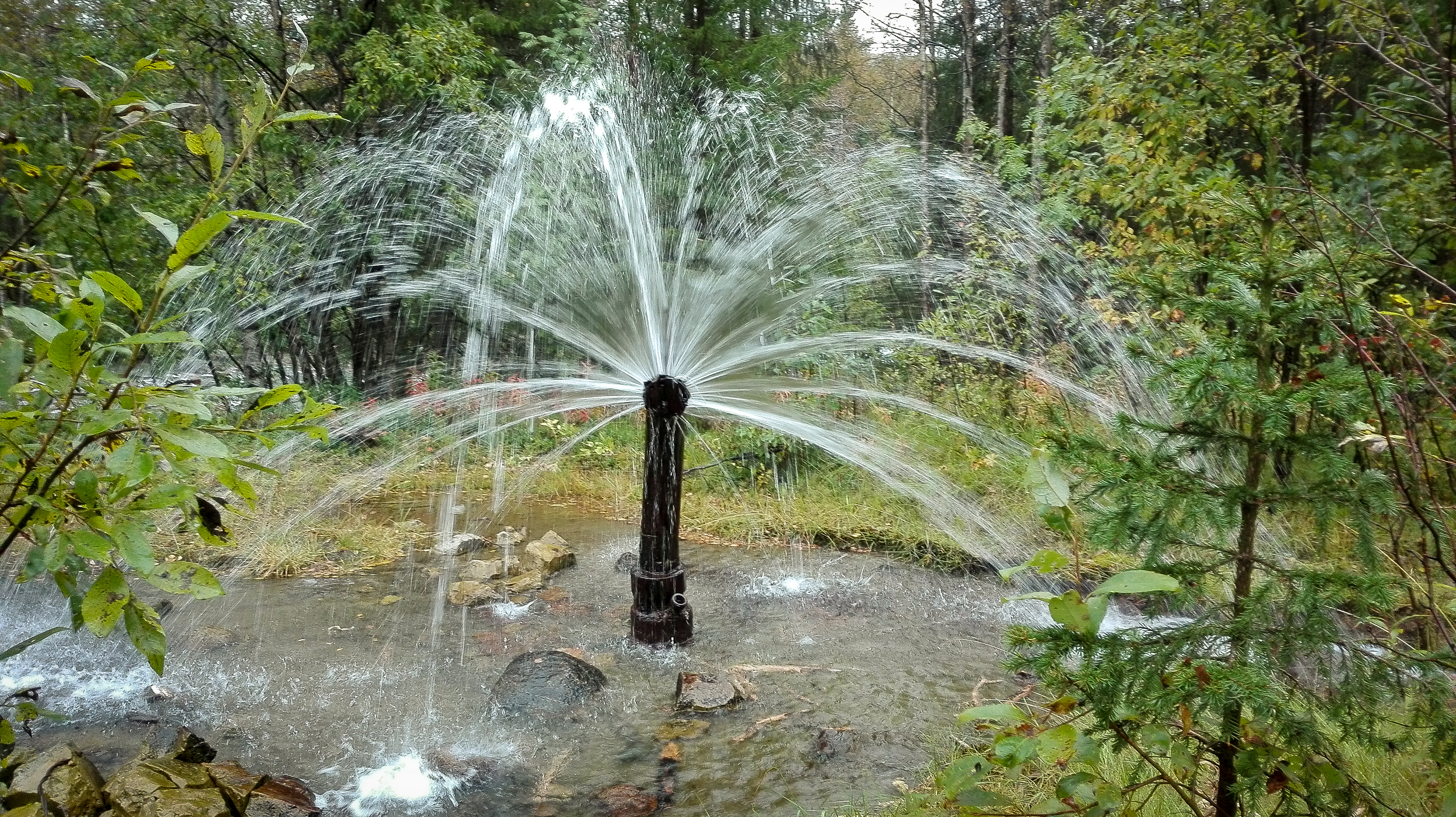 Хибины: Хибинский и Ловозёрский горные массивы за исключением территорий населенных пунктов и горных разработок, Мурманская область This image is related to the protected area of Russia number 5100013